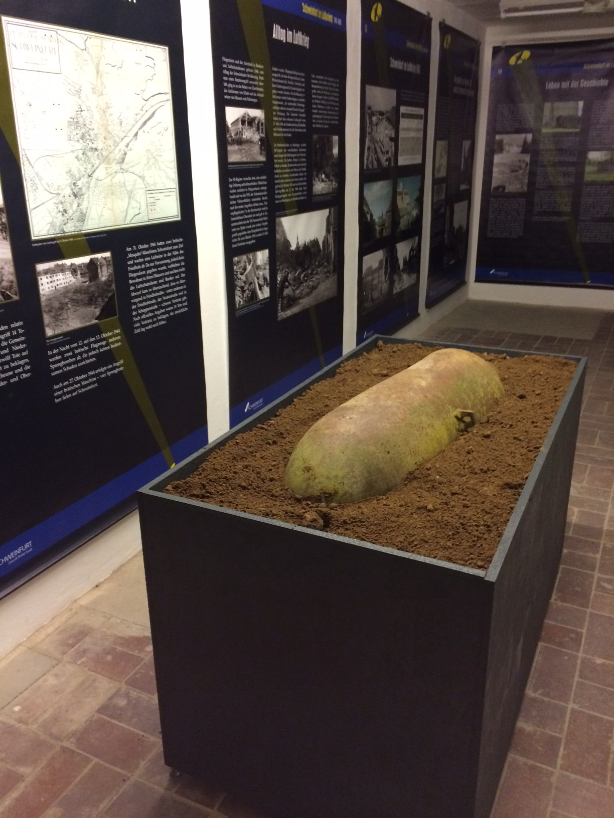 Bunkermuseum